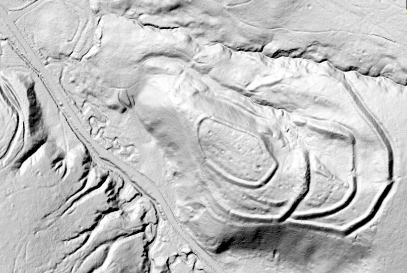 Burgwall BANUSZ Tuliglowy Grundriss